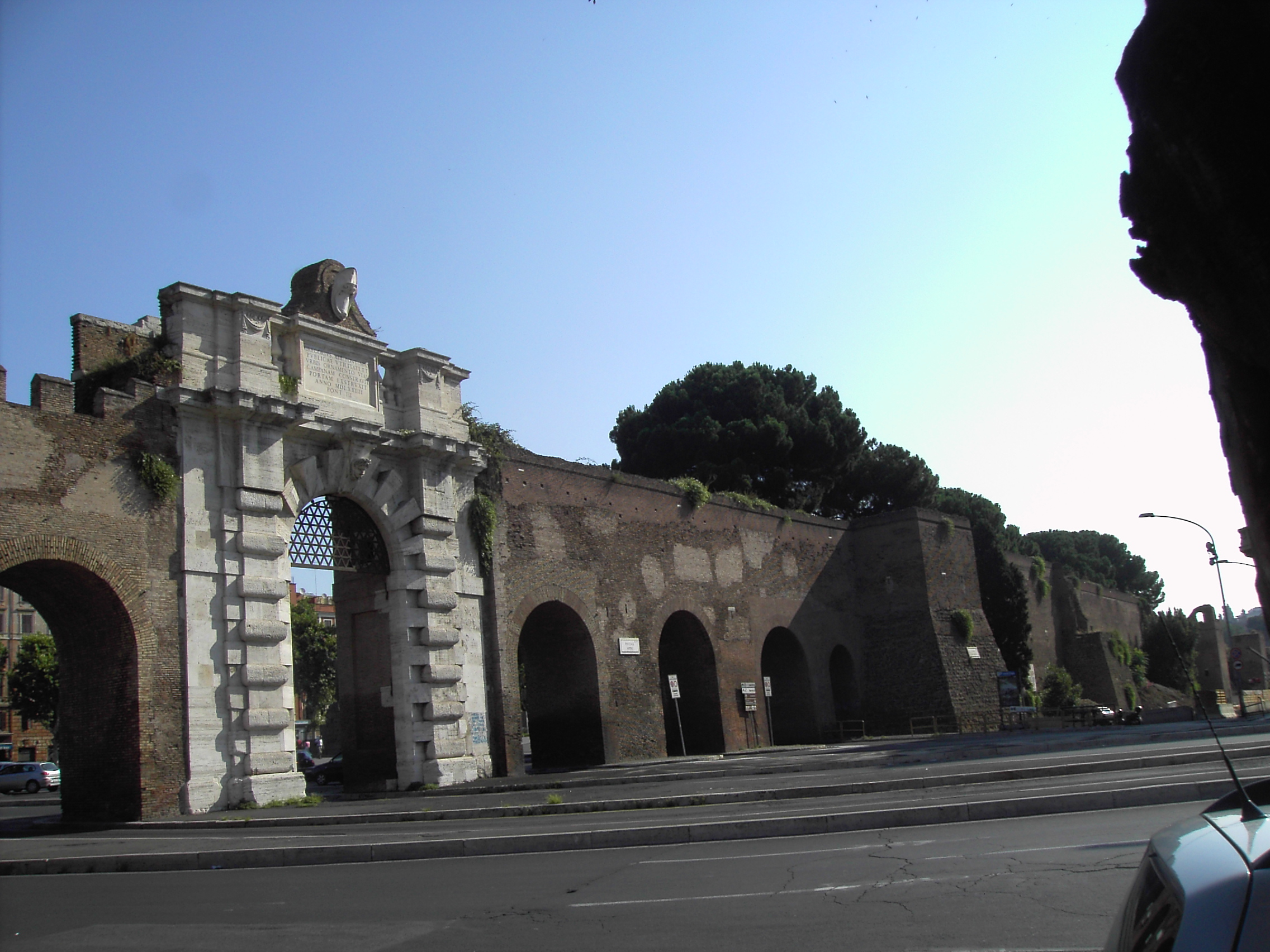 Roma , Porta san Giovanni (facciata esterna)